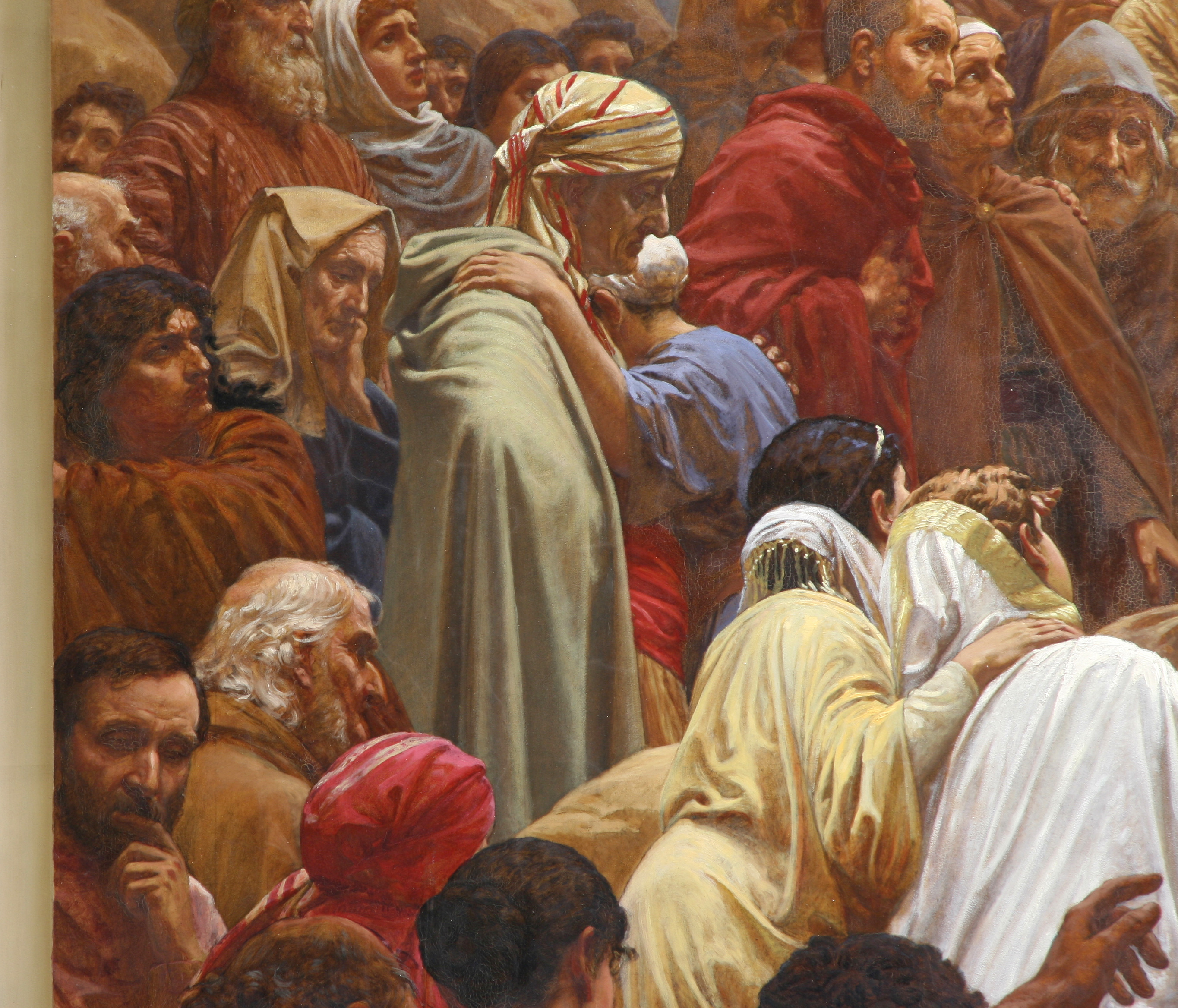 Sankt Matthæus Kirke, Copenhagen, Denmark. Altarpiece - "Sermon on the Mount" - detail By Henrik Olrik